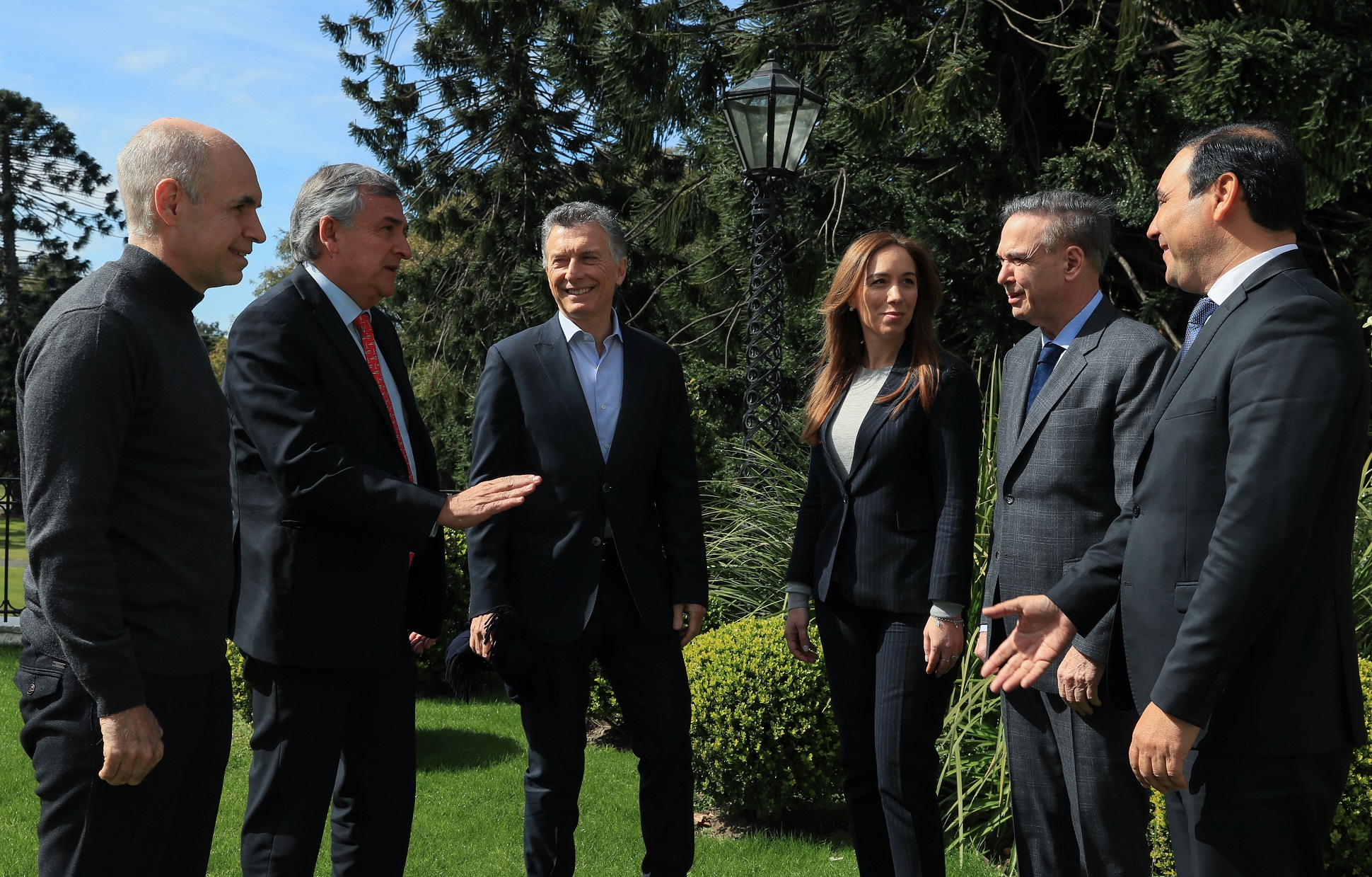 El presidente Mauricio Macri compartió un almuerzo en la residencia de Olivos con los gobernadores de Corrientes, Gustavo Valdés, y de Jujuy, Gerardo Morales; la gobernadora de Buenos Aires, María Eugenia Vidal, y el jefe de Gobierno porteño Horacio Rodríguez Larreta. También participaron del encuentro el senador Miguel Pichetto, el jefe de Gabinete, Marcos Peña, y el ministro del Interior, Obras Públicas y Vivienda, Rogelio Frigerio.